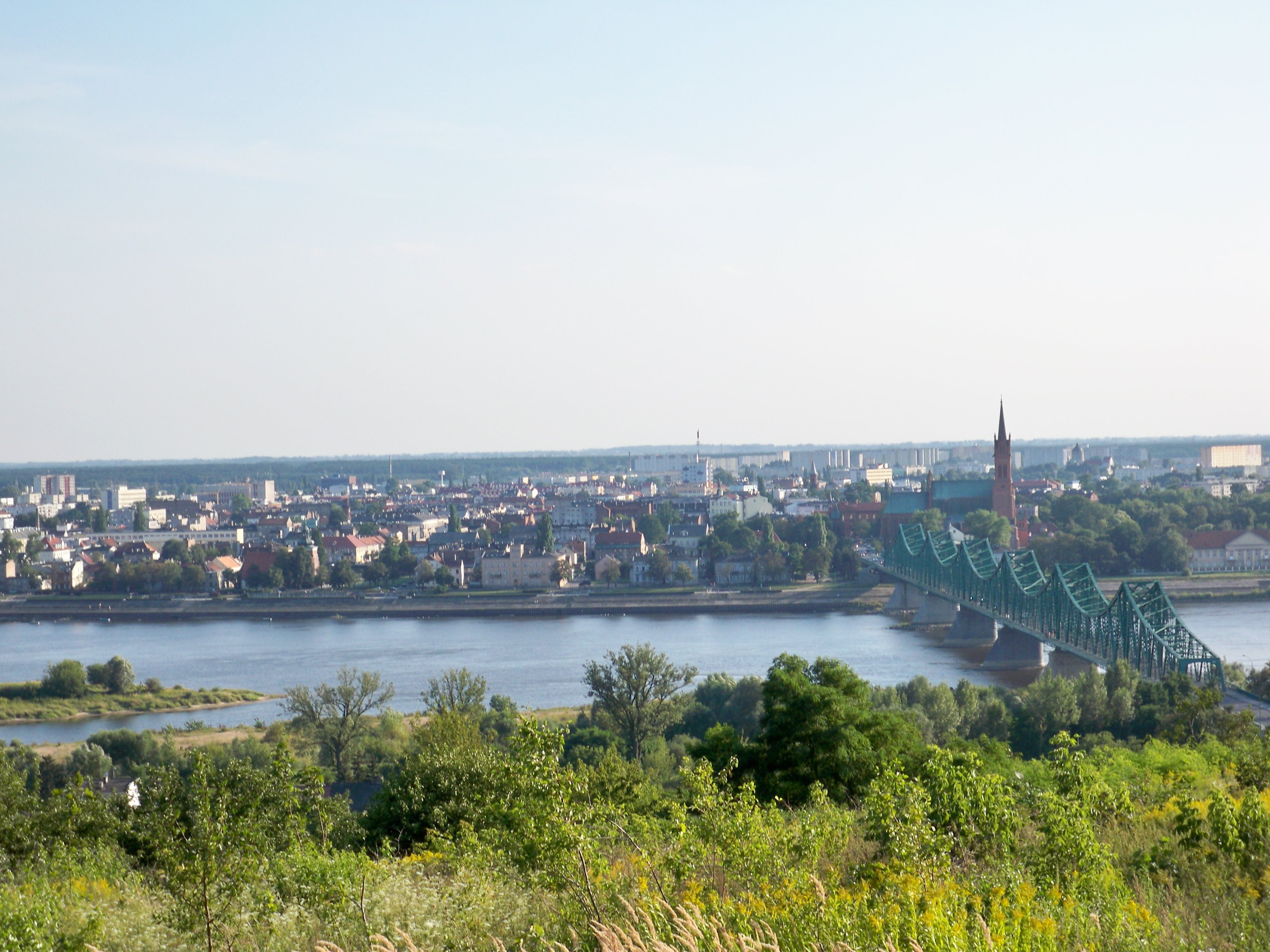 Widok ze Wzgórz Szpetalskich (2009 r.)